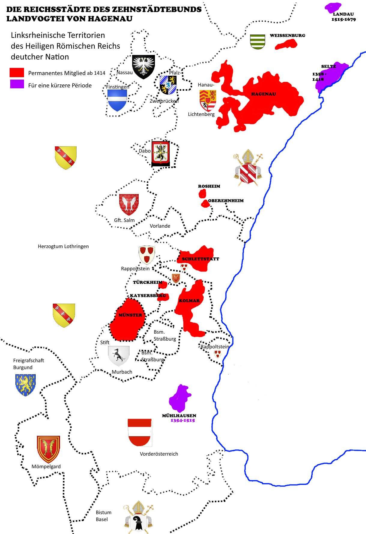 Zehstädtebund - Décapole Alsace